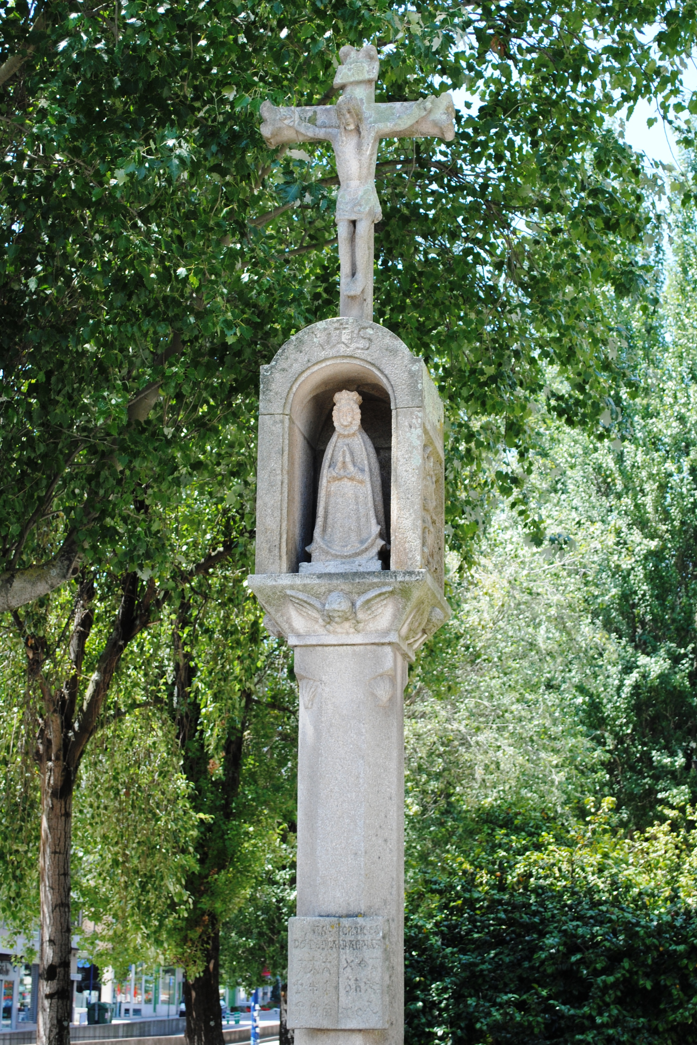 As Travesas, Vigo, cruceiro de capela.